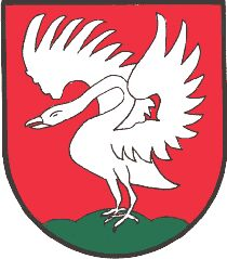 Wappen der Gemeinde Bad Schwanberg